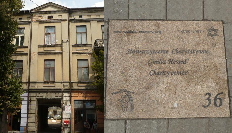 Radomsko. Otwarte Muzeum Żydowskie 36